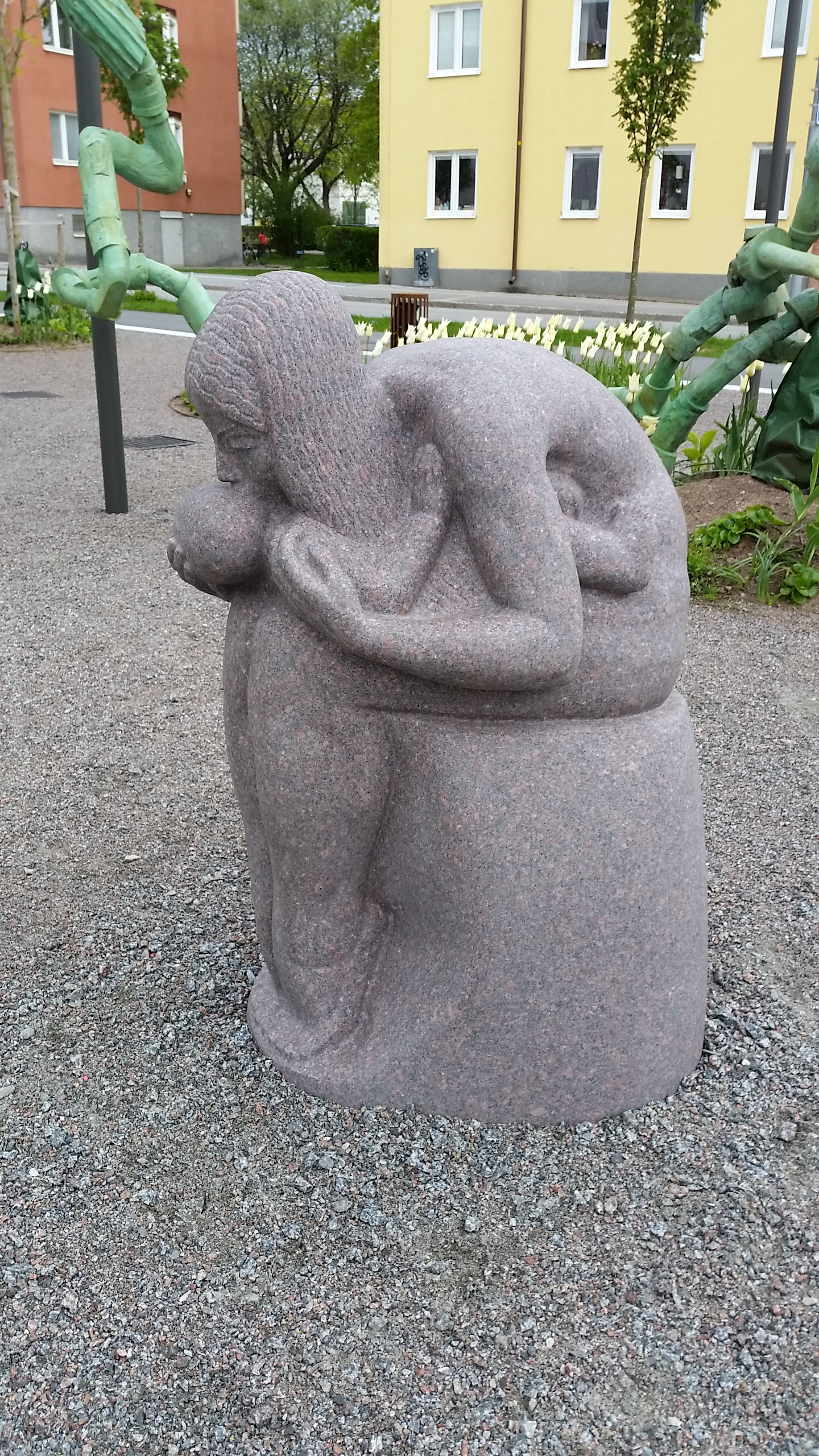 Mor och barn (2014) - Anna Petrus. Uppsala